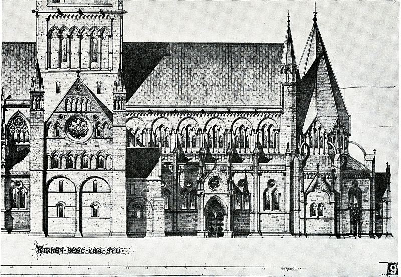 Østre den, syd av Nidarosdommen, rekonstruksjon, Christie.